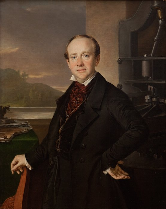 Портрет Николая Семеновича Селивановского. Художник В.А. Тропинин. 1843 год. ГИМ